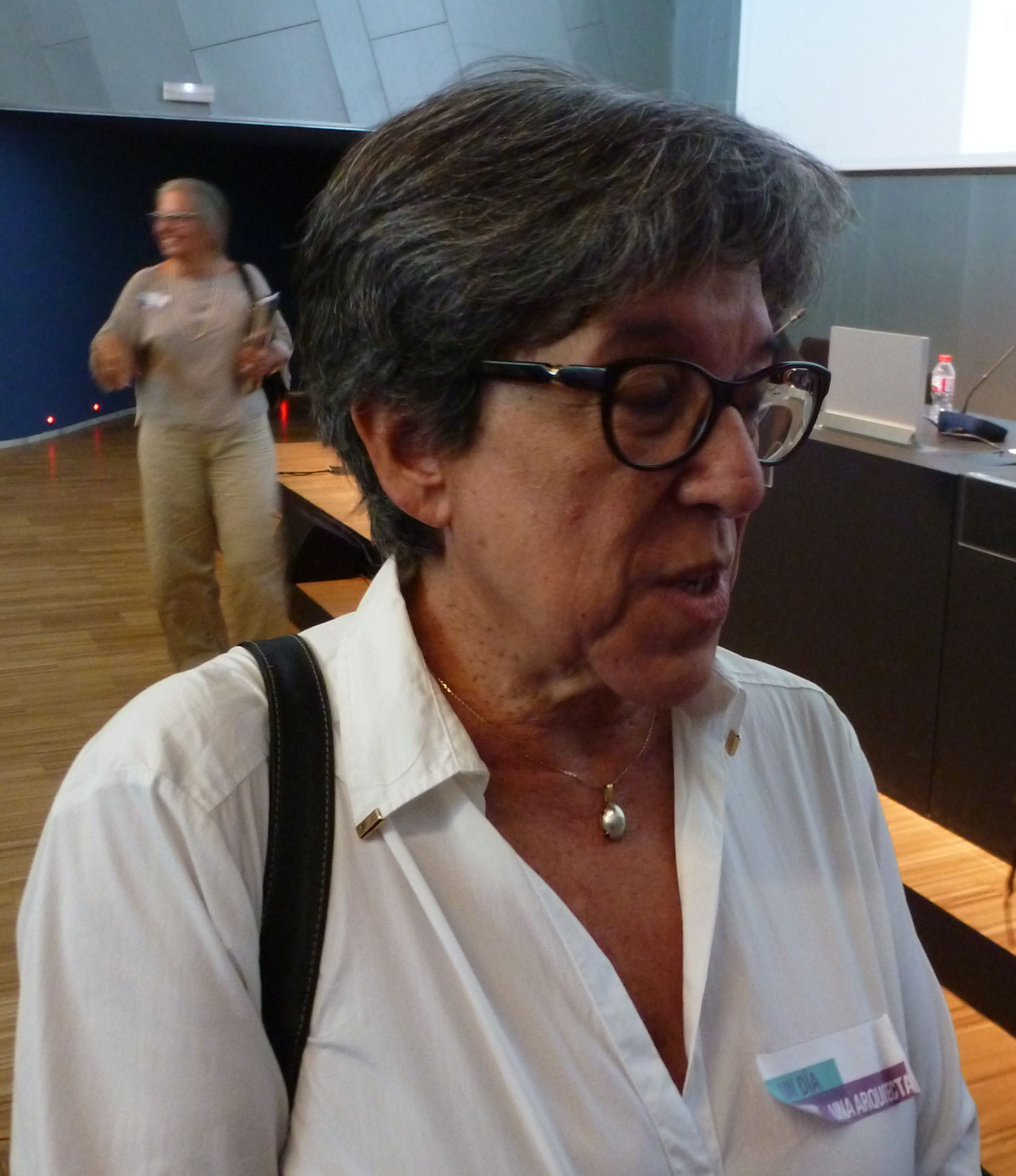 Anna Bofill Levi, arquitecta española